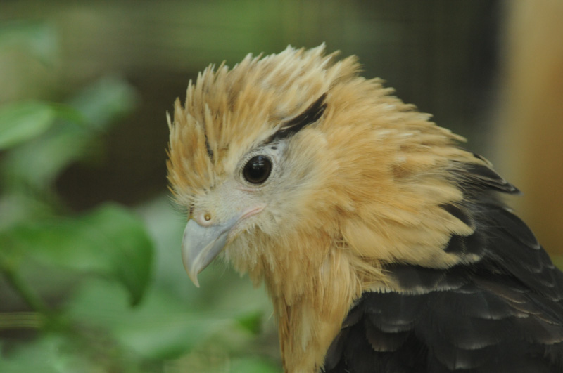 geelkopcaracara-2.jpg